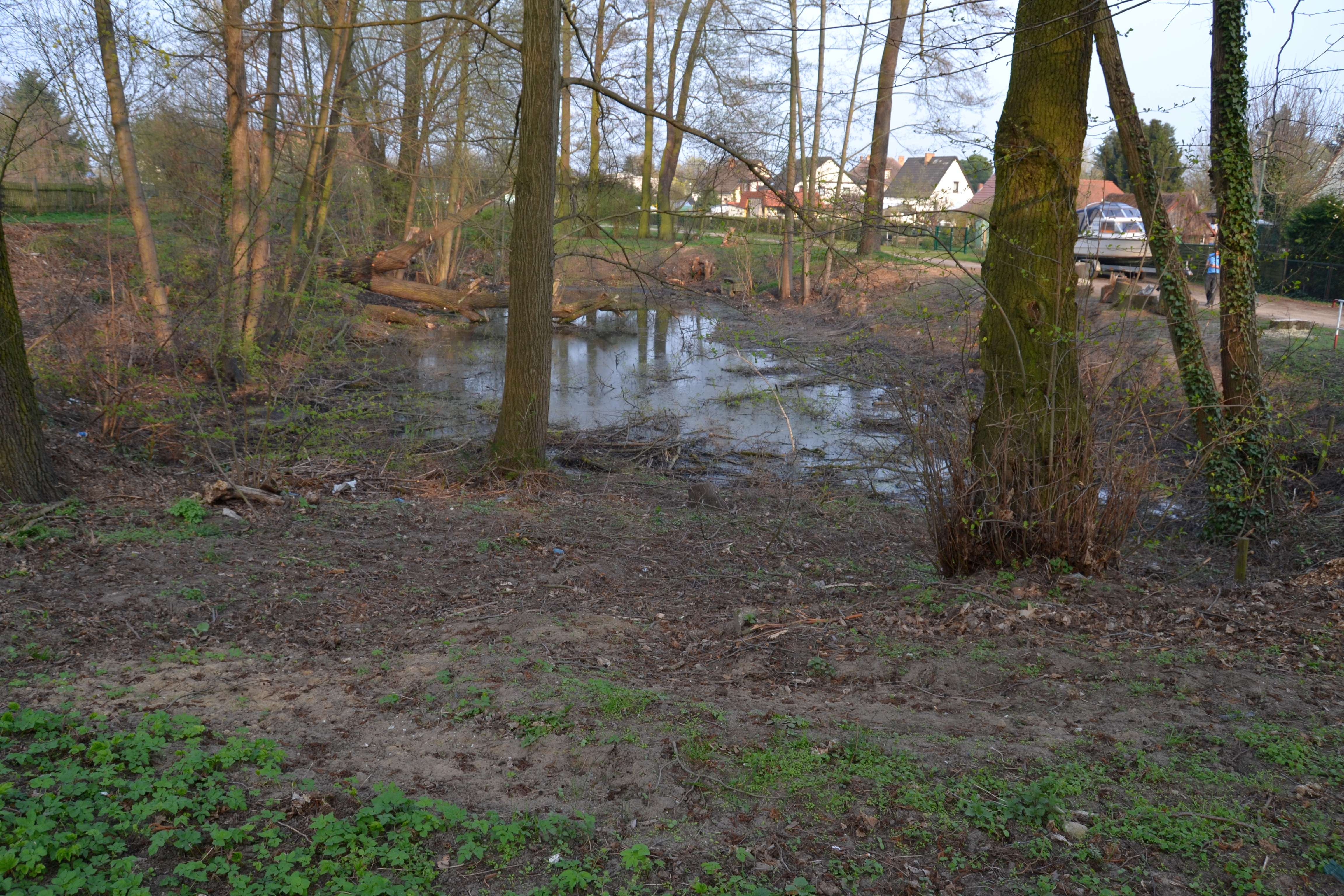 Ahés Pfuhl an der Eichbergstraße in Woltersdorf bei Berlin.